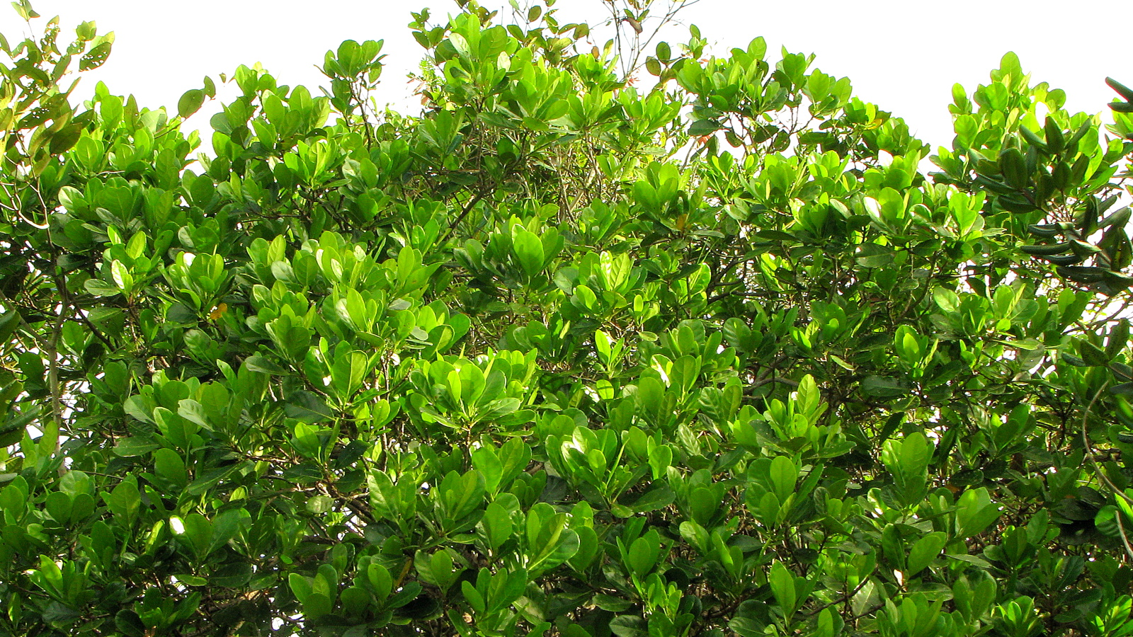 Richeria grandis